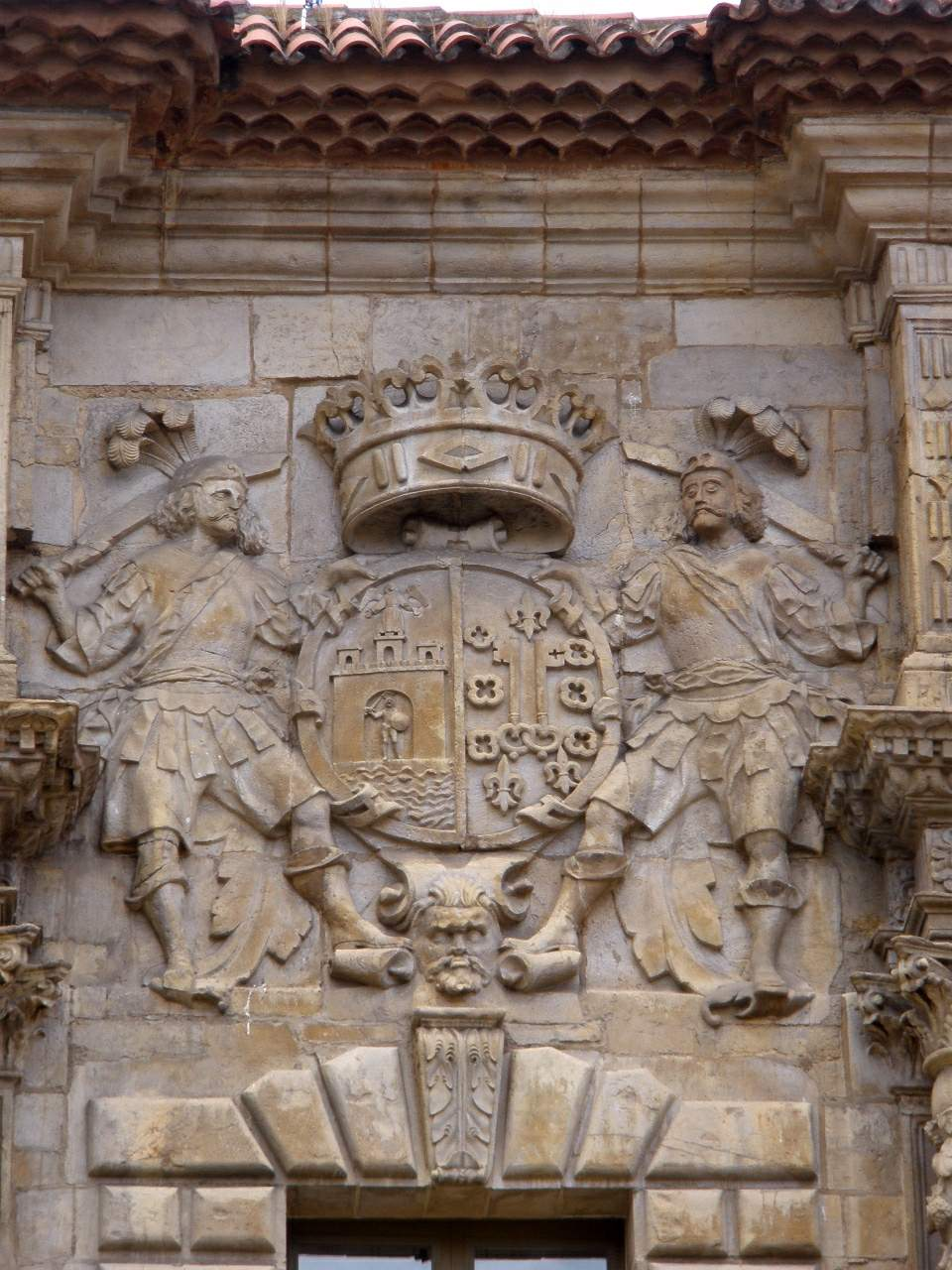 Aviles - Palacio del Marques de Camposagrado (Escuela Superior de Arte de Asturias)